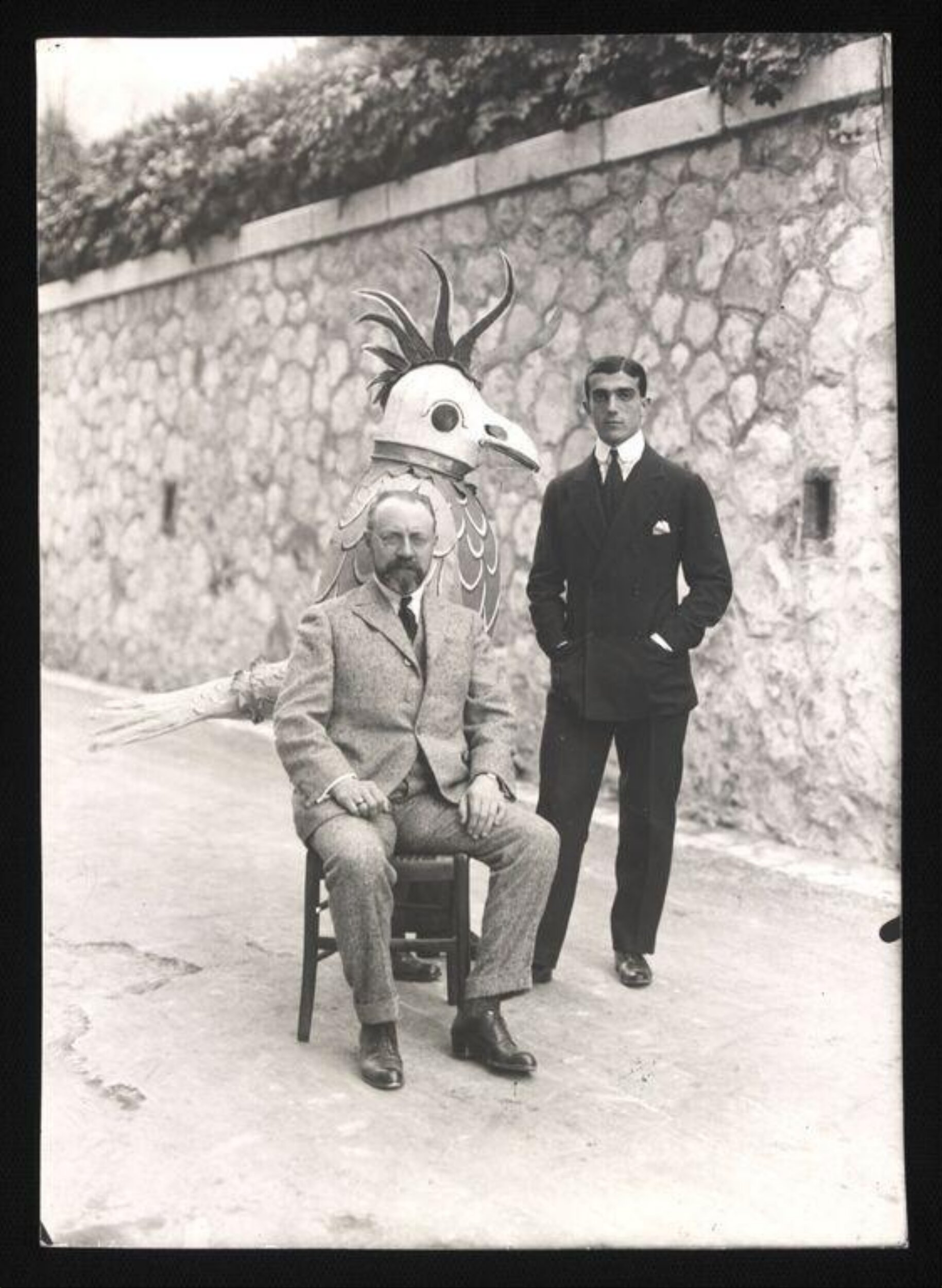 Joseph Enrietti Photographie Henri Matisse et Léonide Massine et le Rossignol mécanique à Monte-Carlo 1920 Exposition Ballets russes Bibliothèque-musée de l'Opéra de Paris